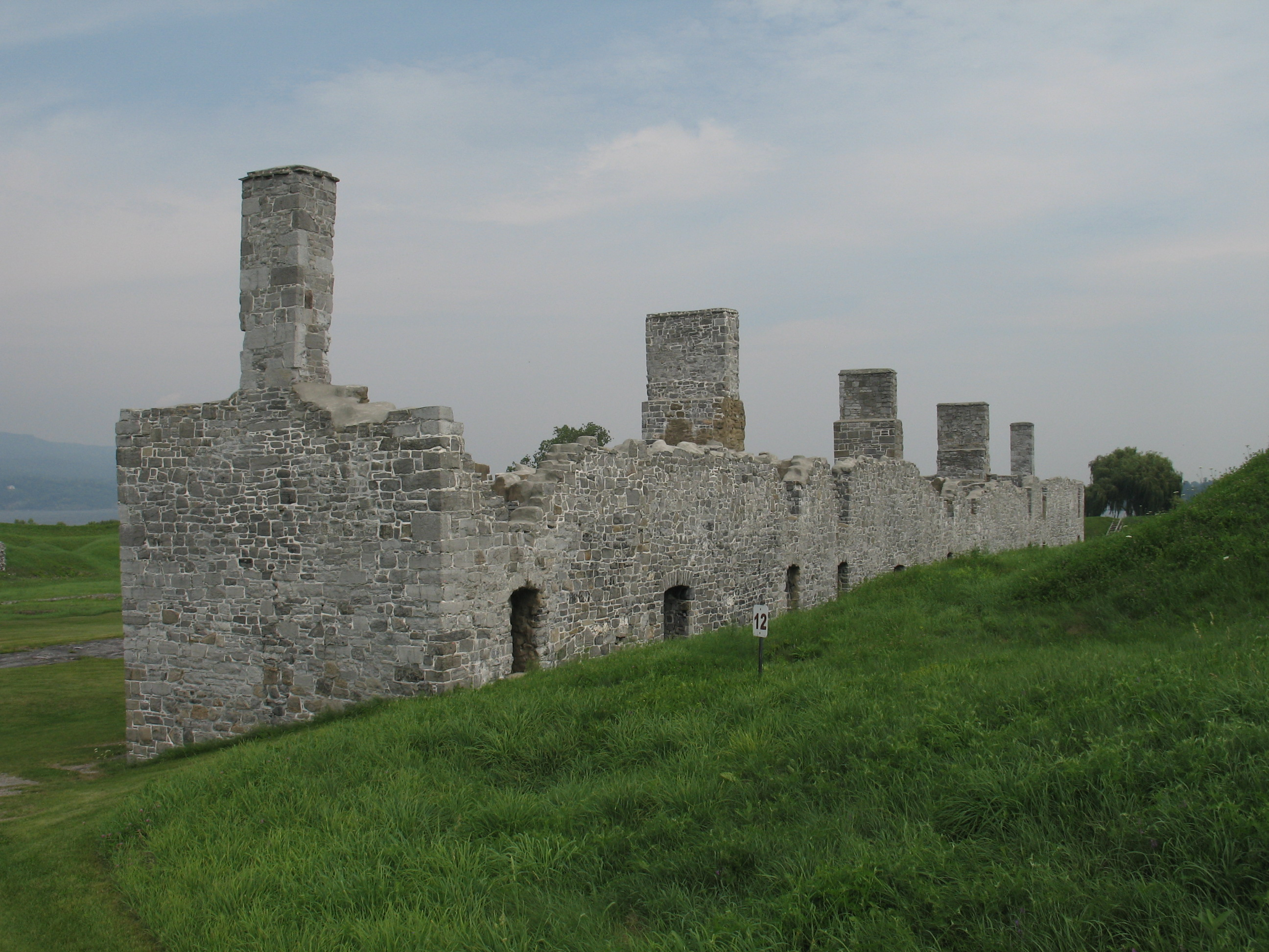 Fort Crown Point